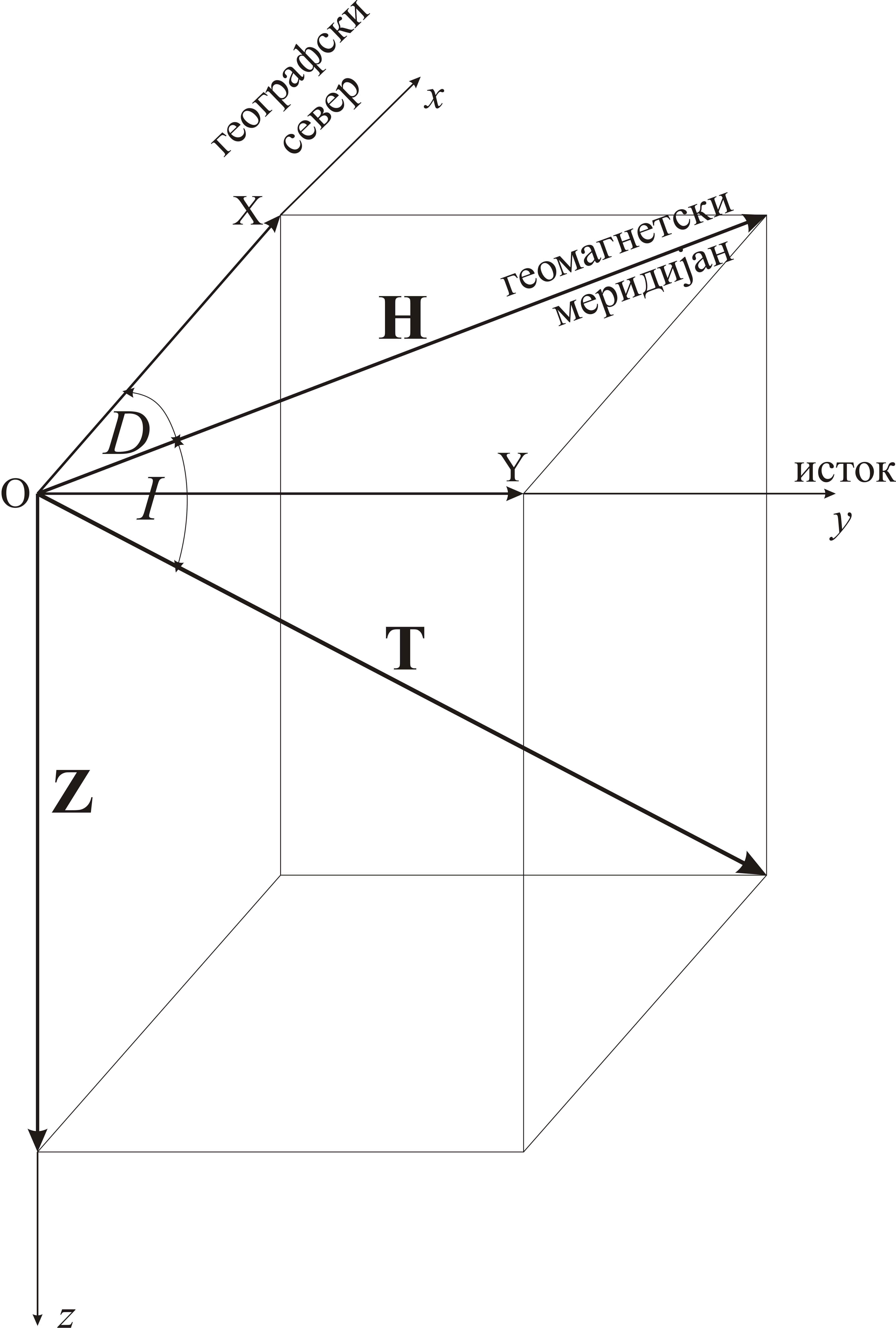 Елементи магнетског поља Земље